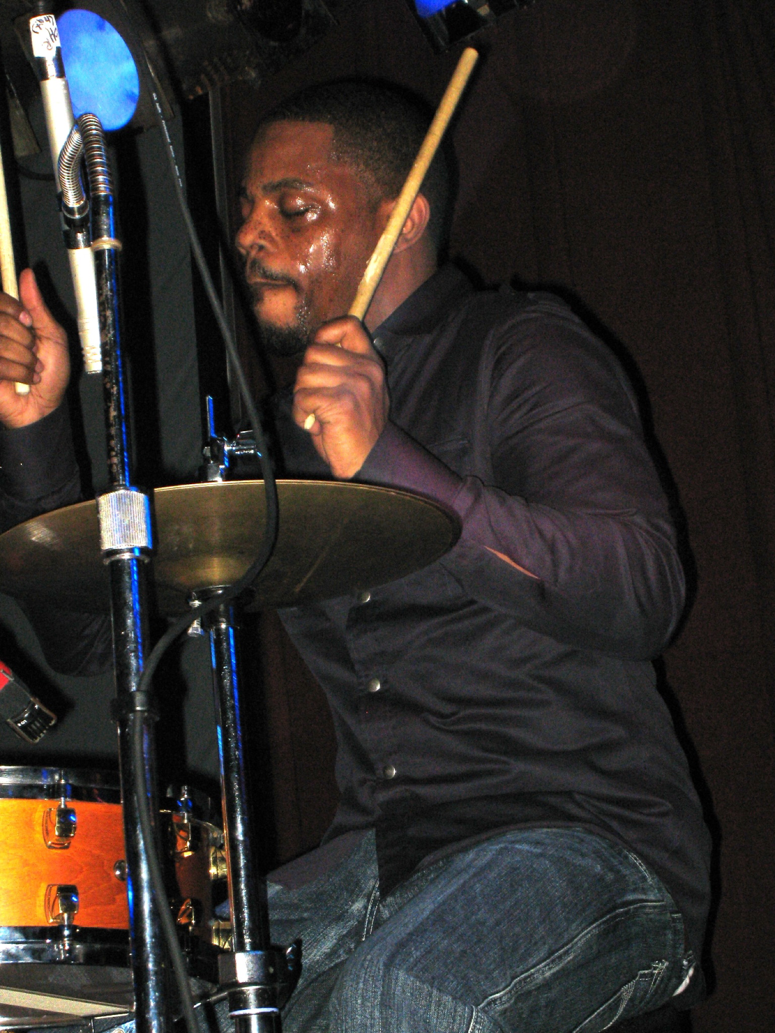 Karriem Riggins (Paradise)